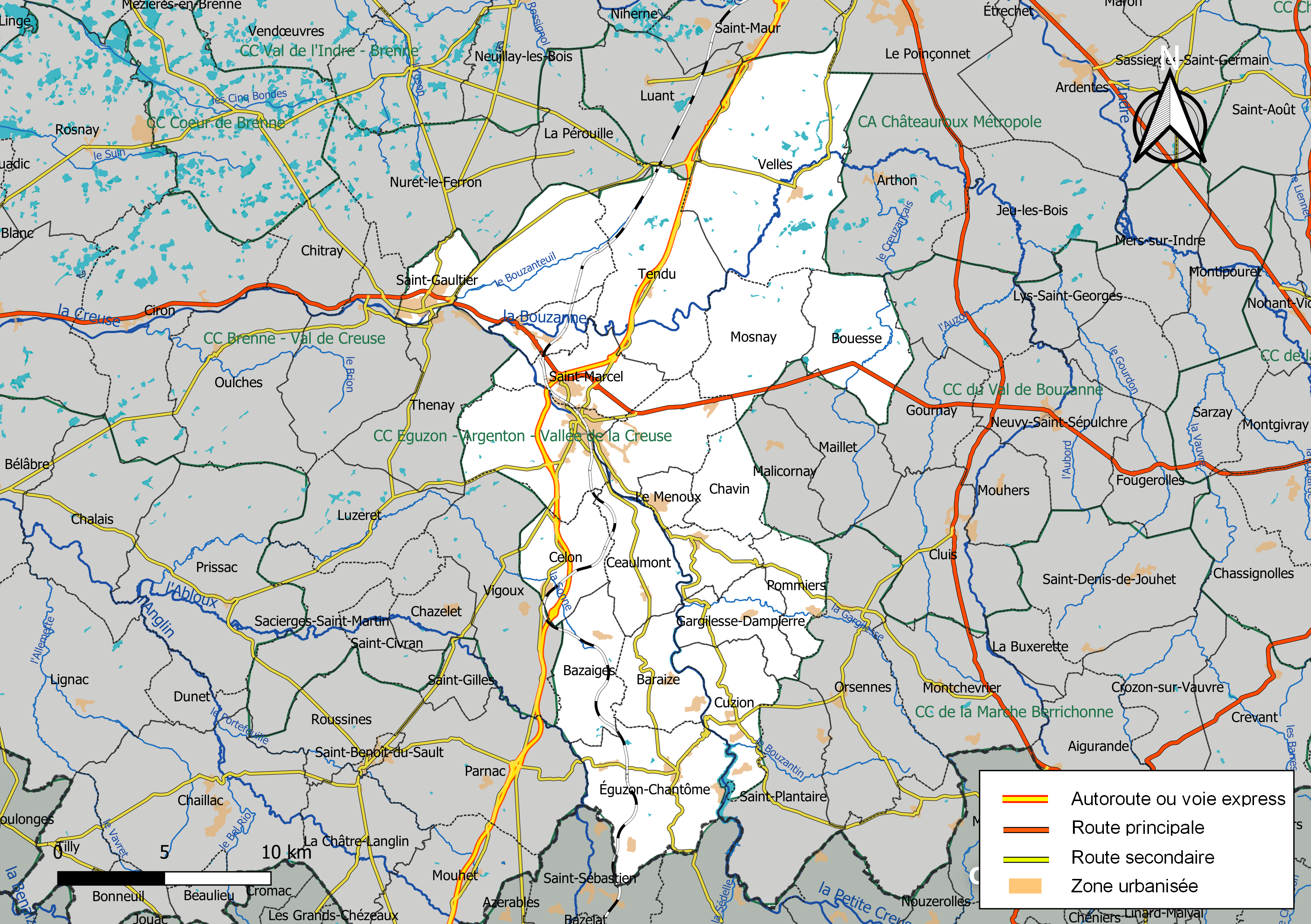 Carte de la communauté de communes Éguzon - Argenton - Vallée de la Creuse, département de l'Indre, France. Composition au 1er janvier 2019.